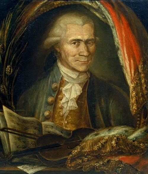 Gemälde - Portrait des Violinisten Paolo Tommaso Alberghi